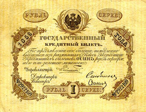 Государственный кредитный билет рубль 1856. Аверс.